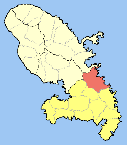 Location of Le François within Martinique